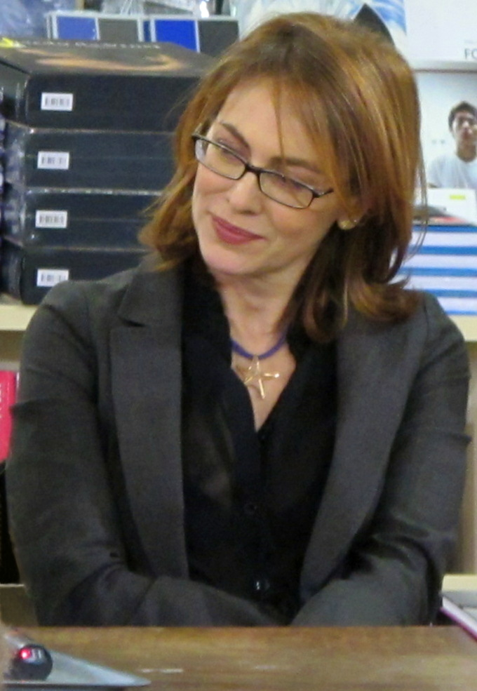 Elena Sofia Ricci alla Feltrinelli di Firenze durante la presentazione del film Mine vaganti